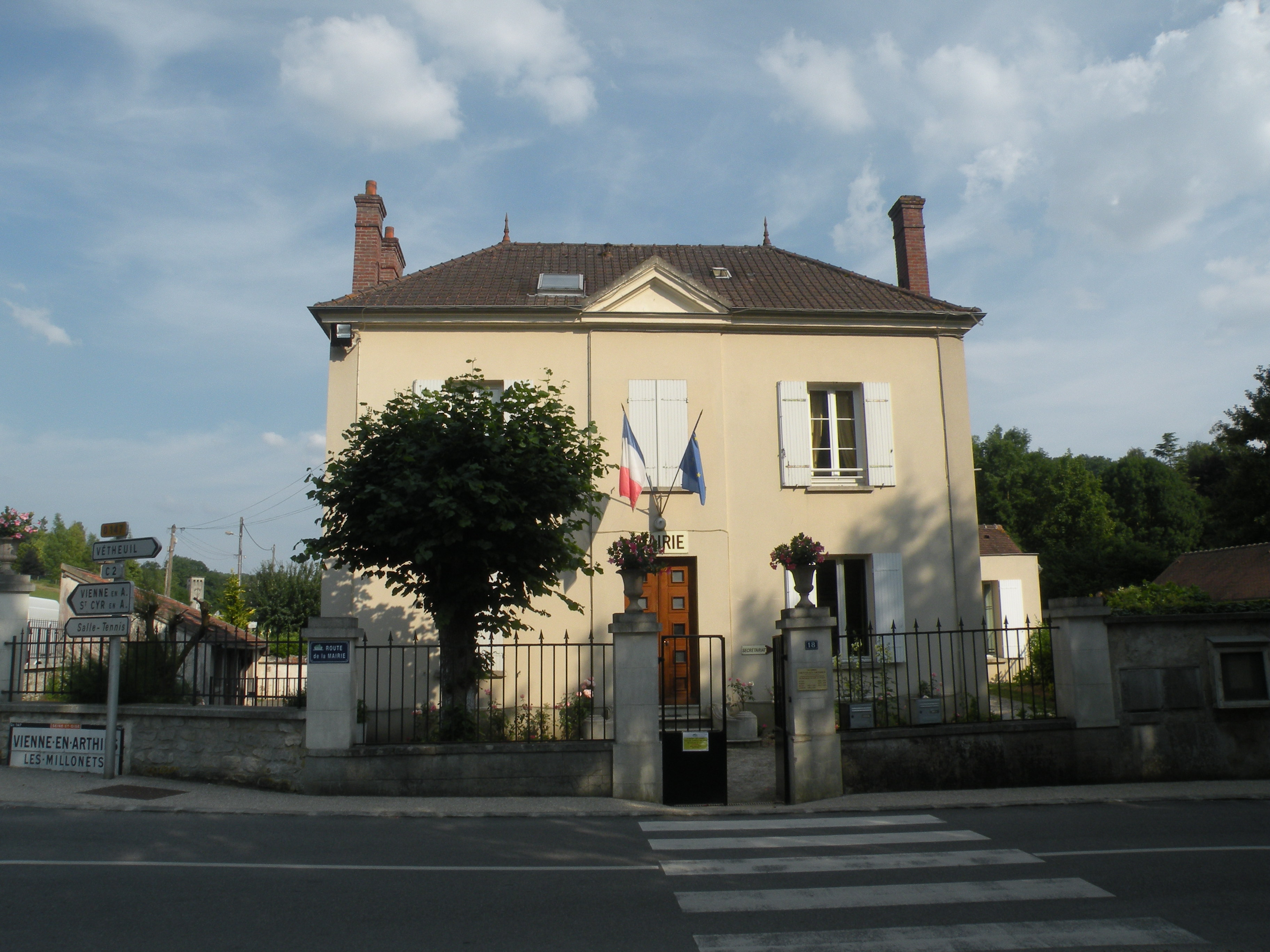 Vienne-en-Arthies mairie